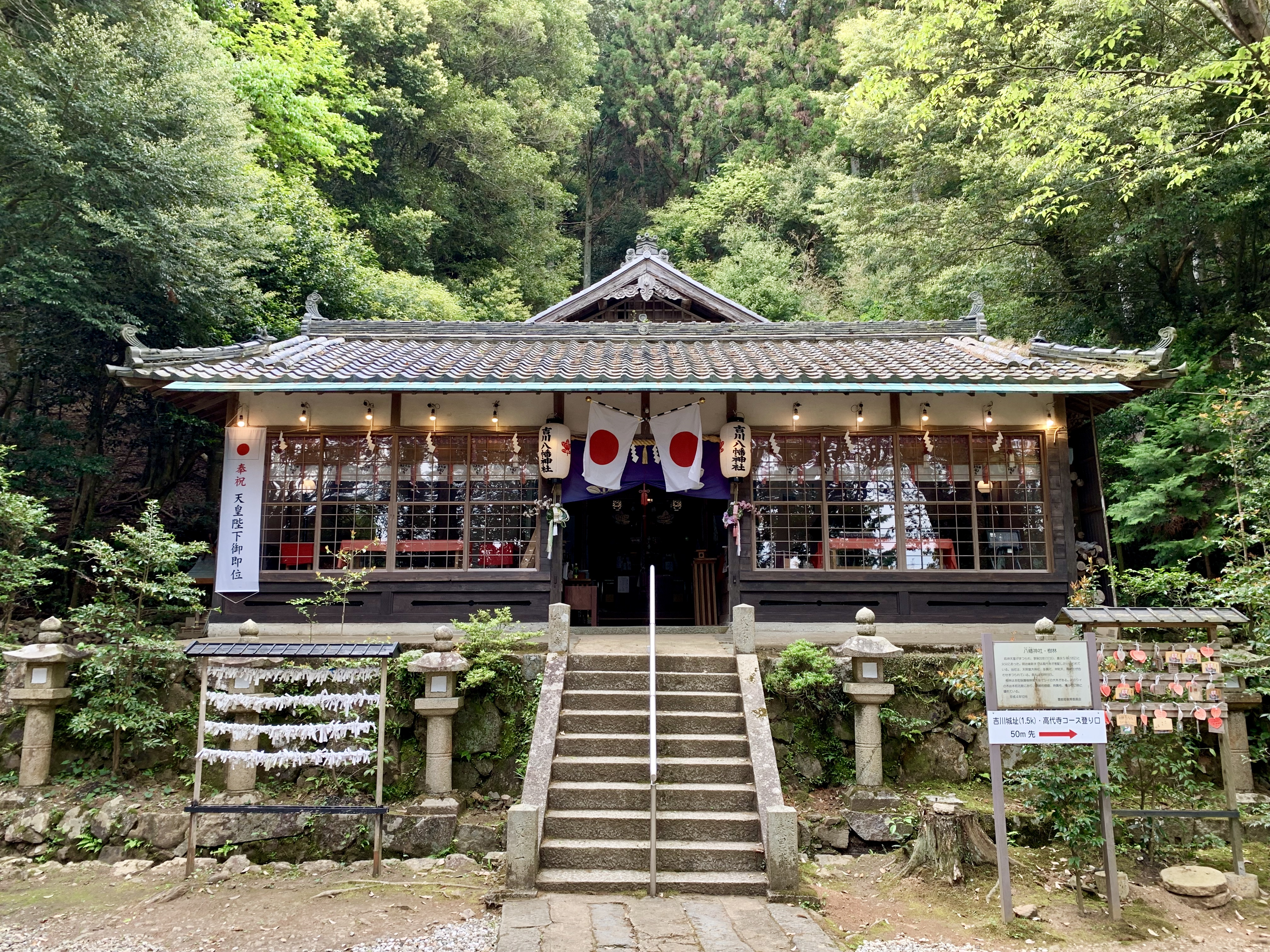 吉川八幡神社の御社殿 大阪府豊能町吉川936